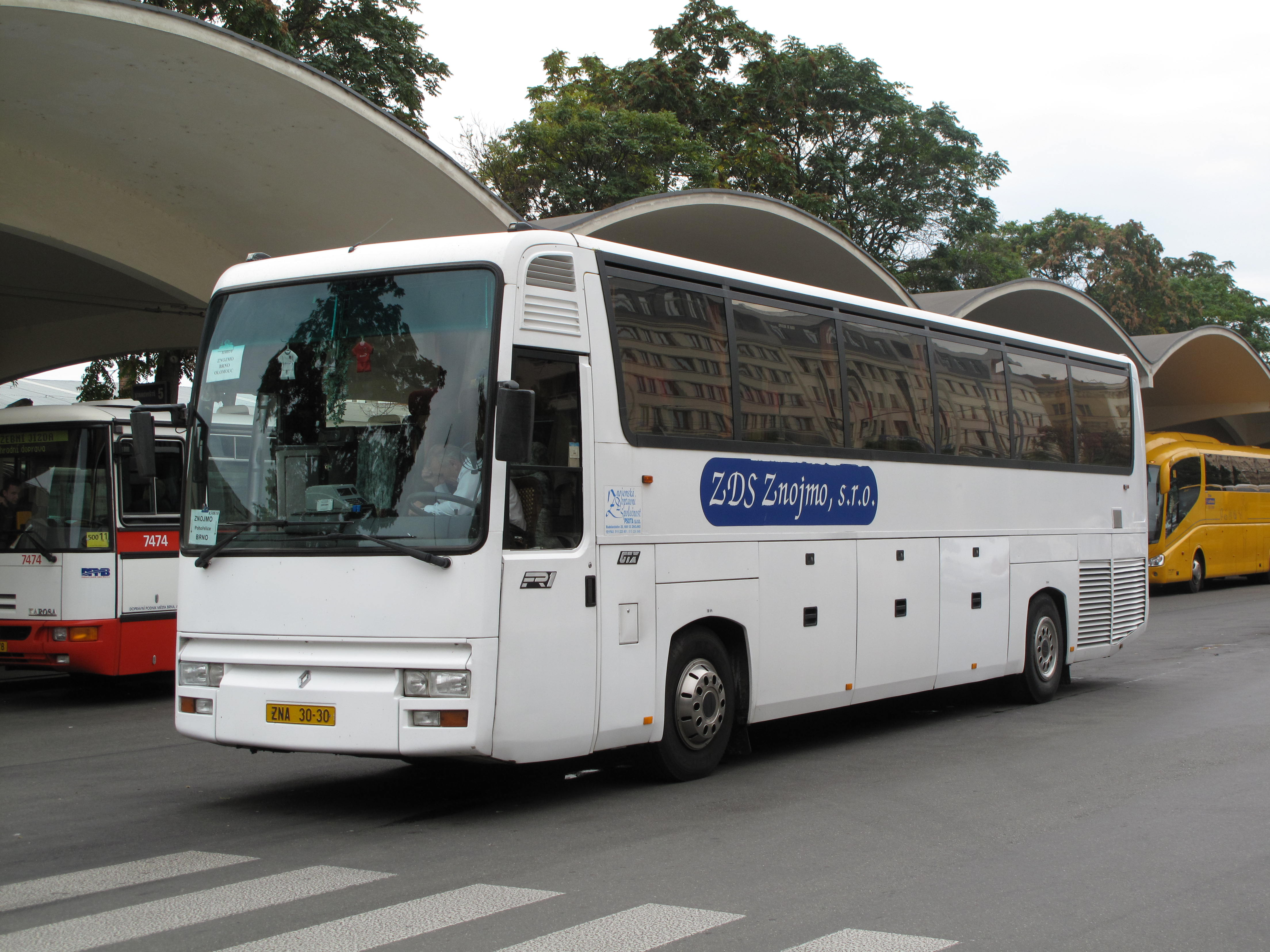 Autobus v Brně